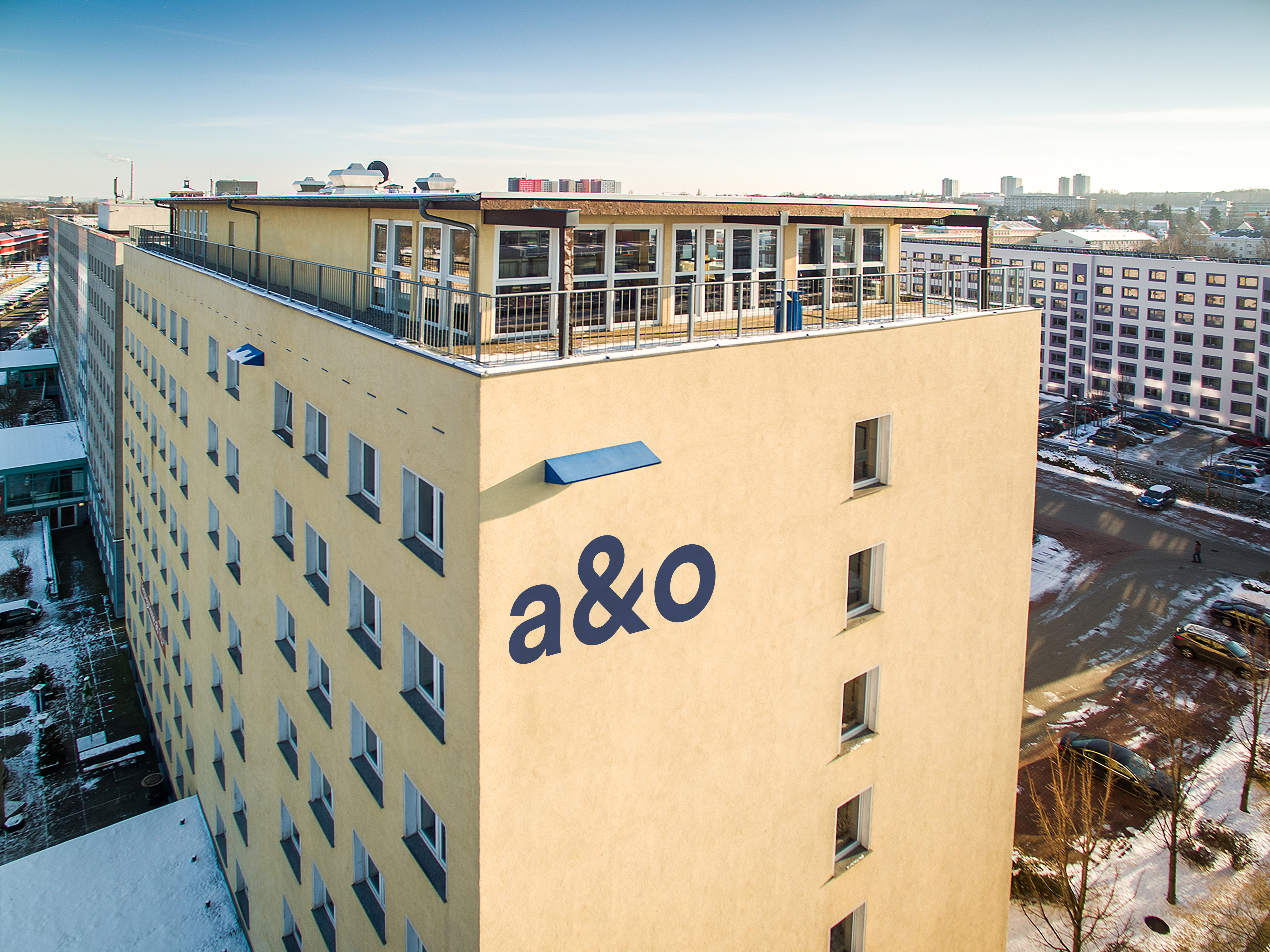 A&O Dresden Building